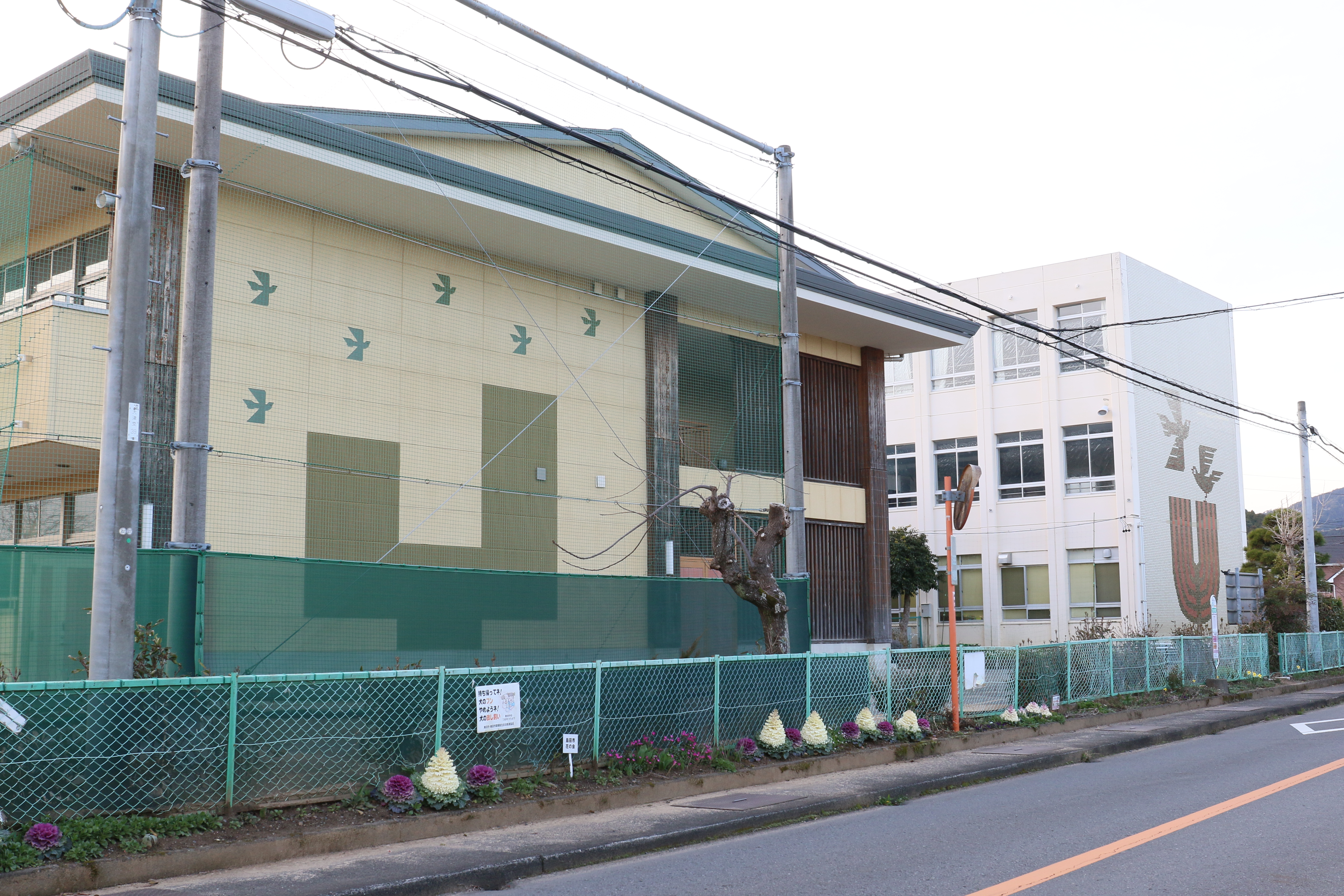 島田市立大津小学校南校舎の壁画を撮影した。